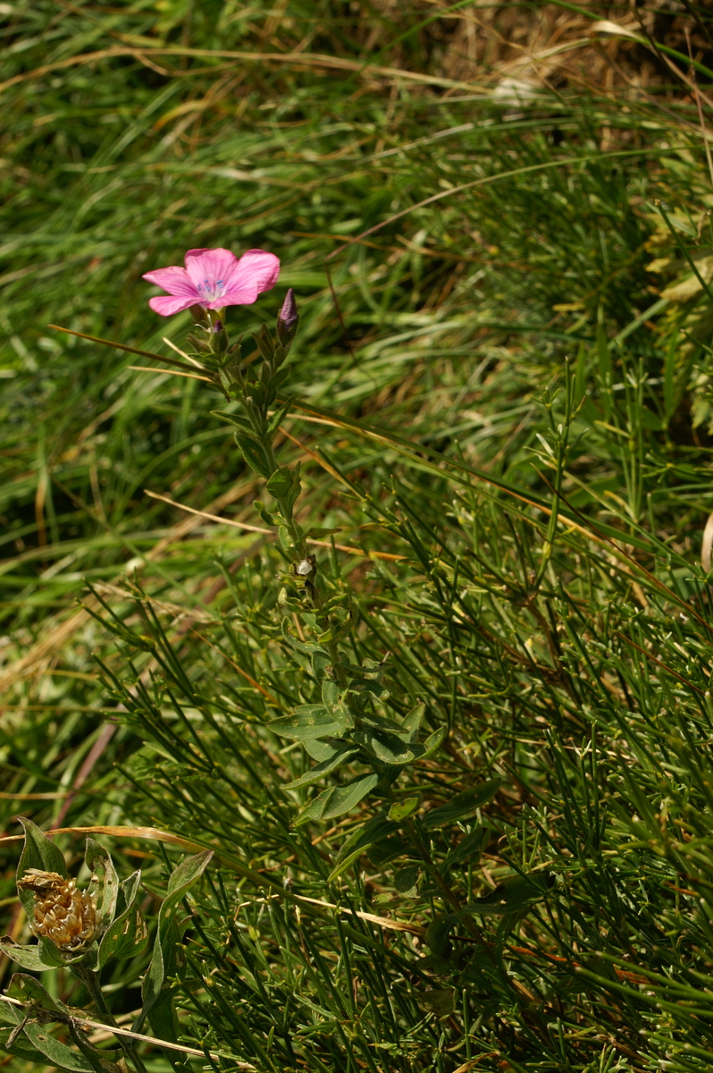 Lepljivi lan na Soriški planini.